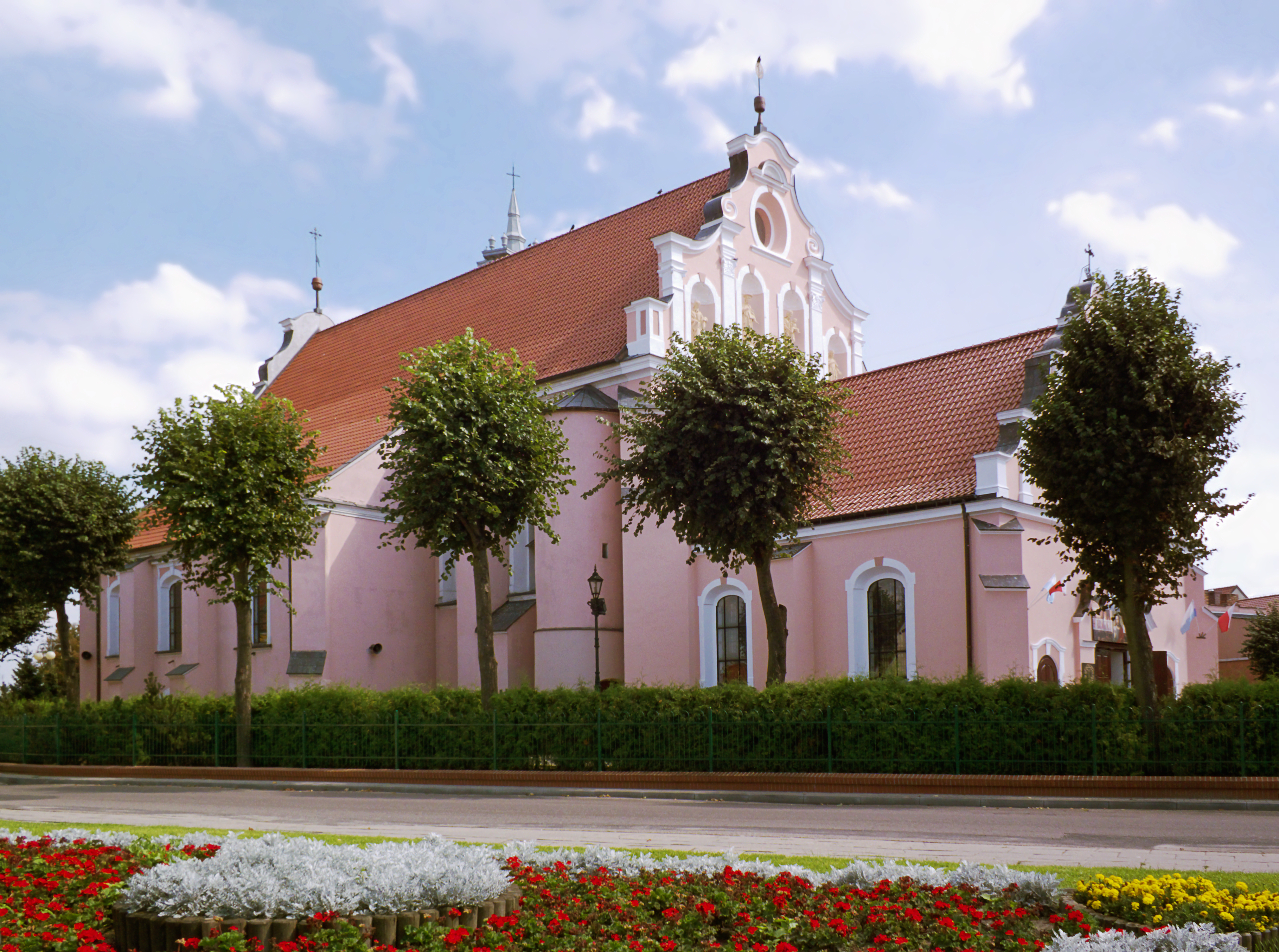 Chodzież, kościół par. p.w. św. Floriana